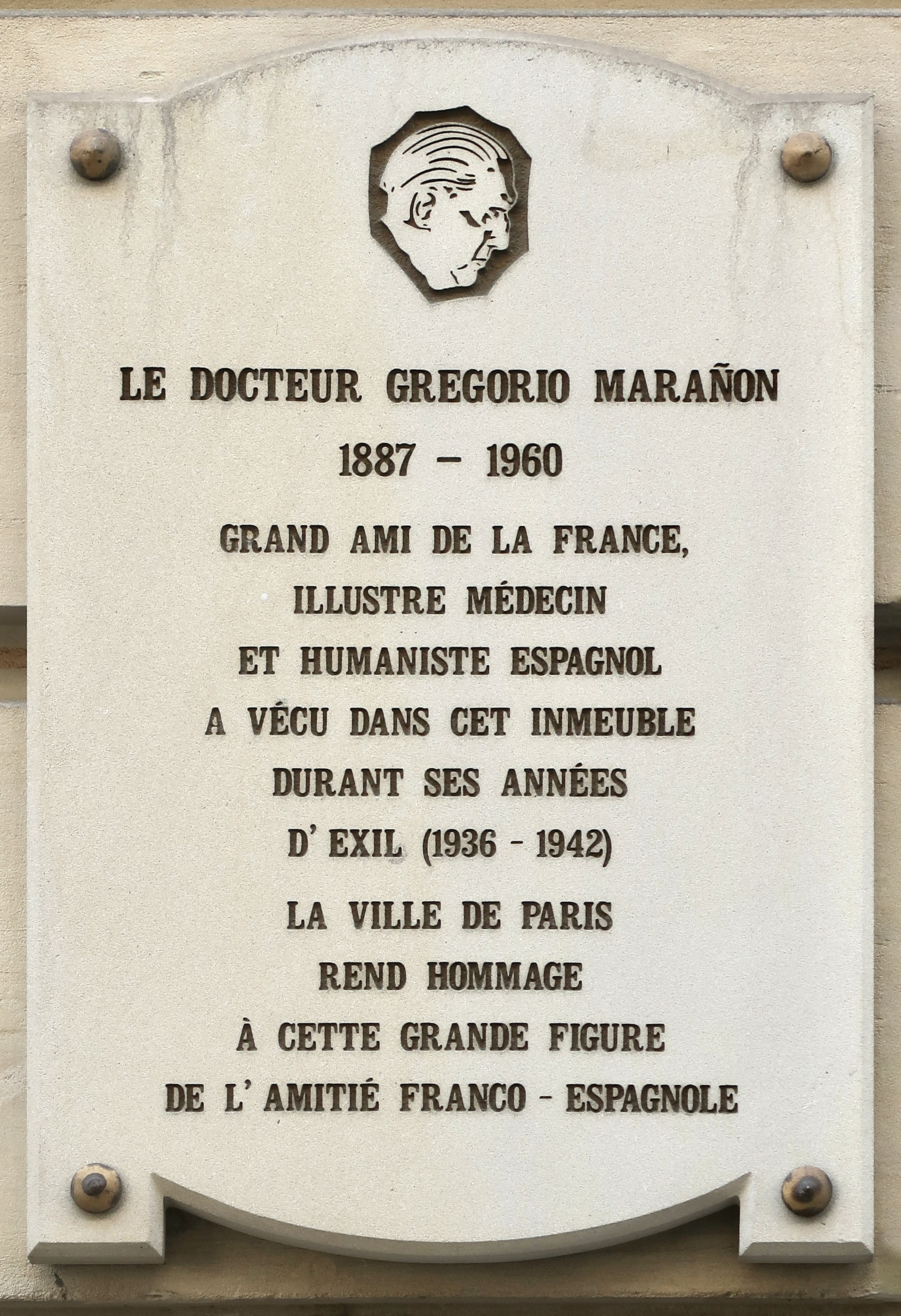 Plaque en hommage à Gregorio Marañón, 7 rue Georges-Ville (Paris, 16e).